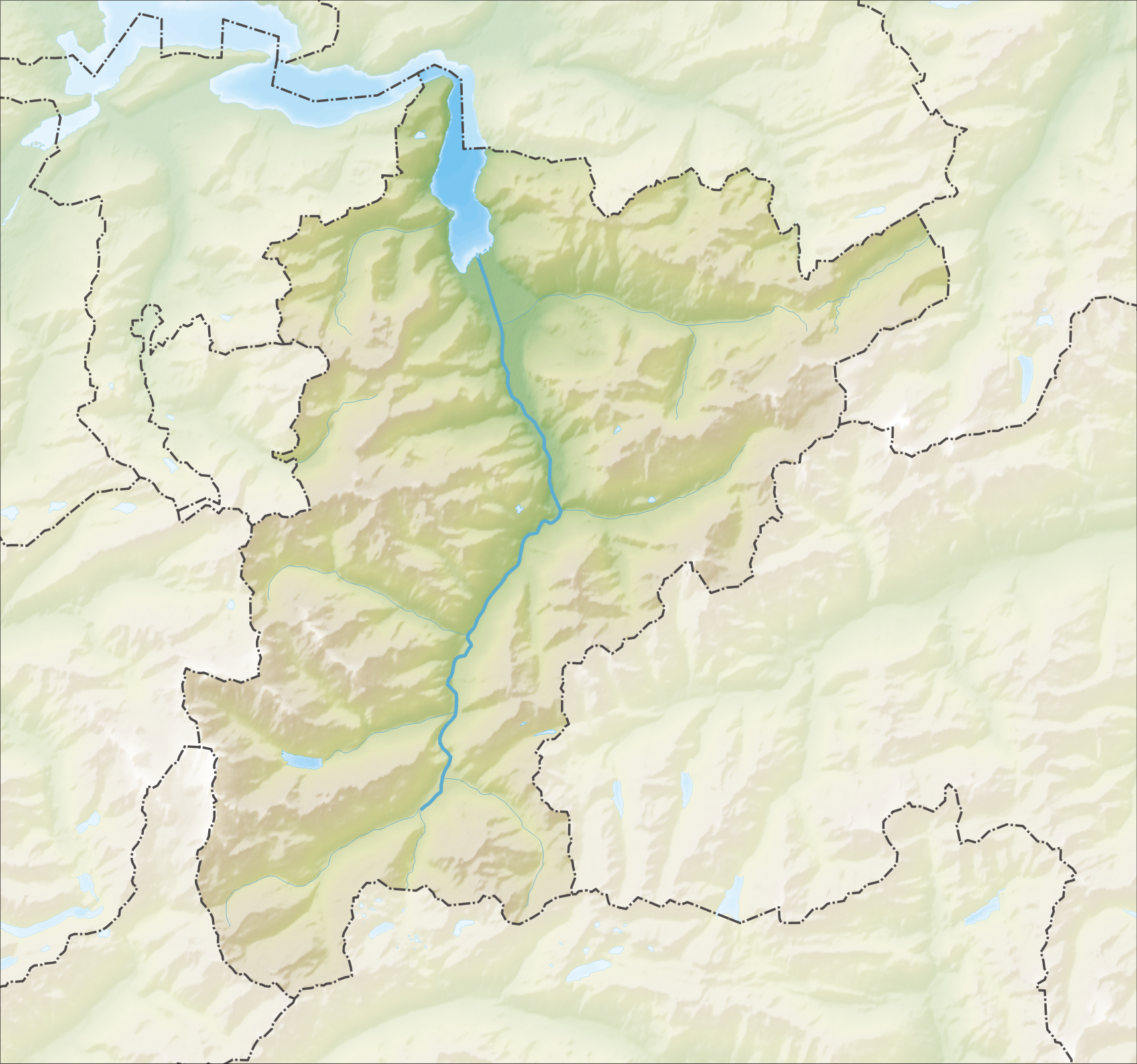 Reliefkarte des Kantons Uri Topographischer Hintergrund: NASA Shuttle Radar Topography Mission (public domain). SRTM3 v.2.